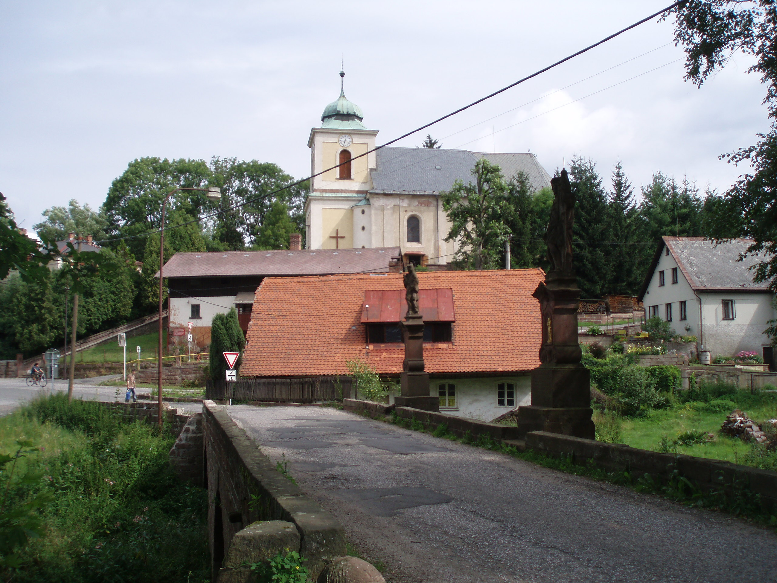 Silniční most (Libštát), V okraj obce, přes Olešku, Libštát